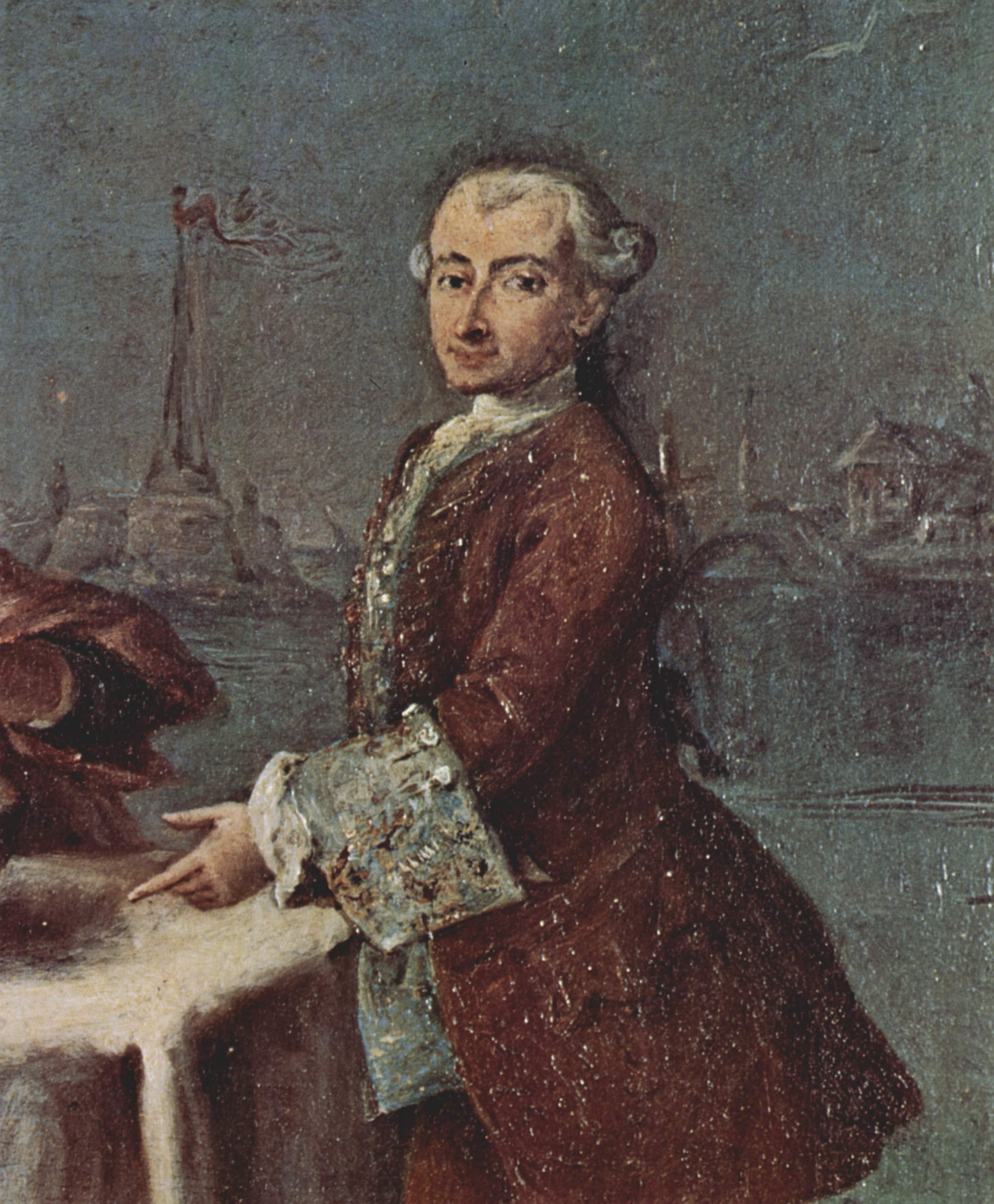 detail